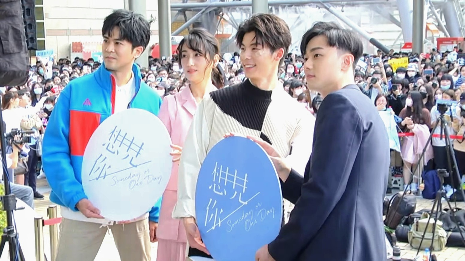 想見你粉絲見面會